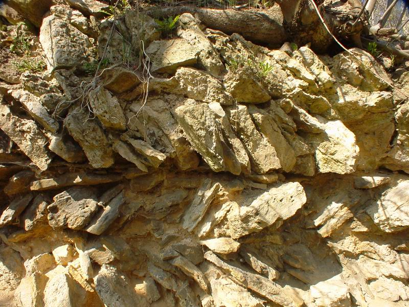 Tautenburg, eigenes Foto von 2001 Mewes 09:22, 13. Feb 2005 (CET) opus spicatum Mauerwerk der Ringmauer, public domain